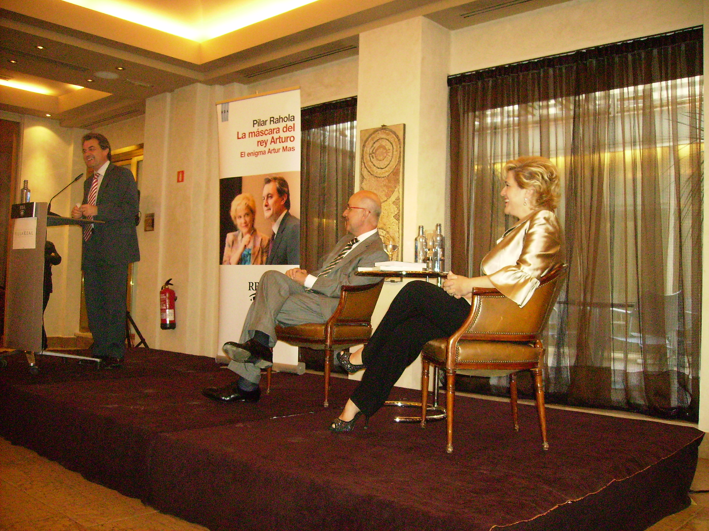 Artur Mas, Josep Antoni Duran Lleida i Pilar Rahola, a Madrid a la presentació de la versió en castellà de "La màscara del rei Artur"Digital camera